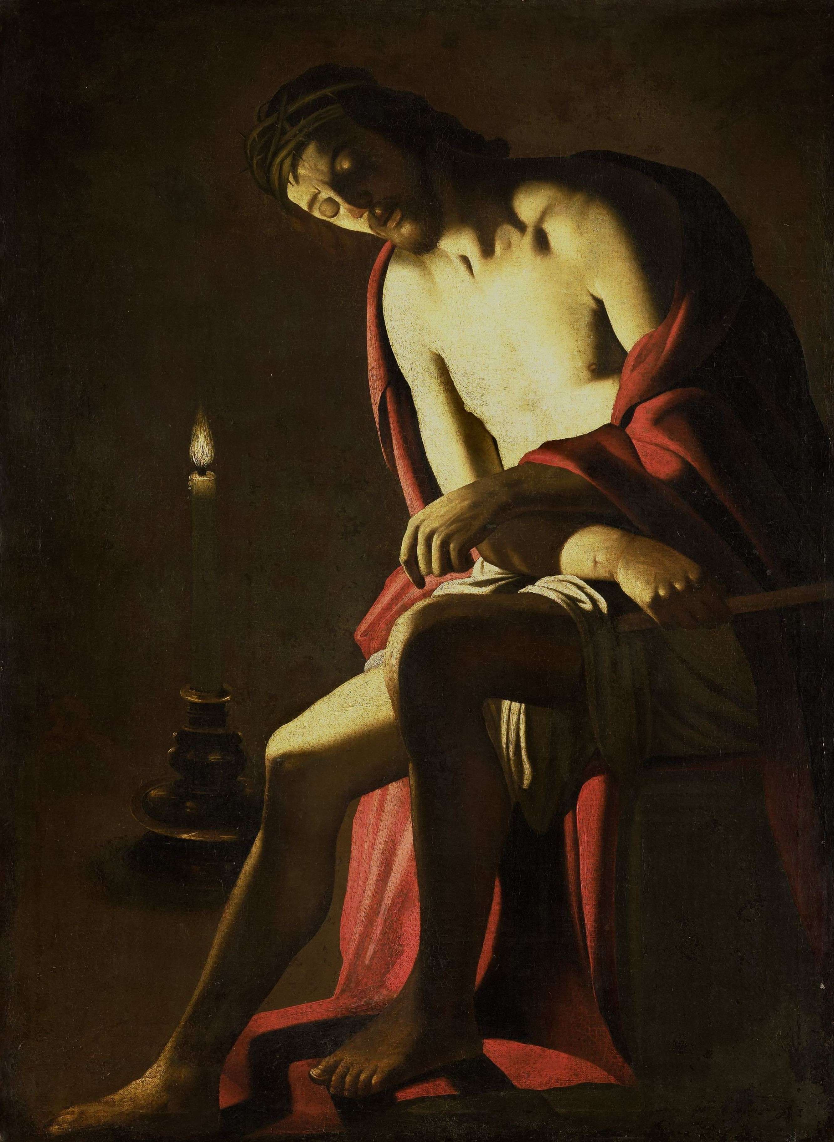 Christus op de koude steen. Christus zittend op een bankje, doornenkroon op het hoofd. Links een brandende kaars. Kopie naar de bespotting van Christus door Honthorst uit ca. 1614 in het Gettymuseum in Malibu.